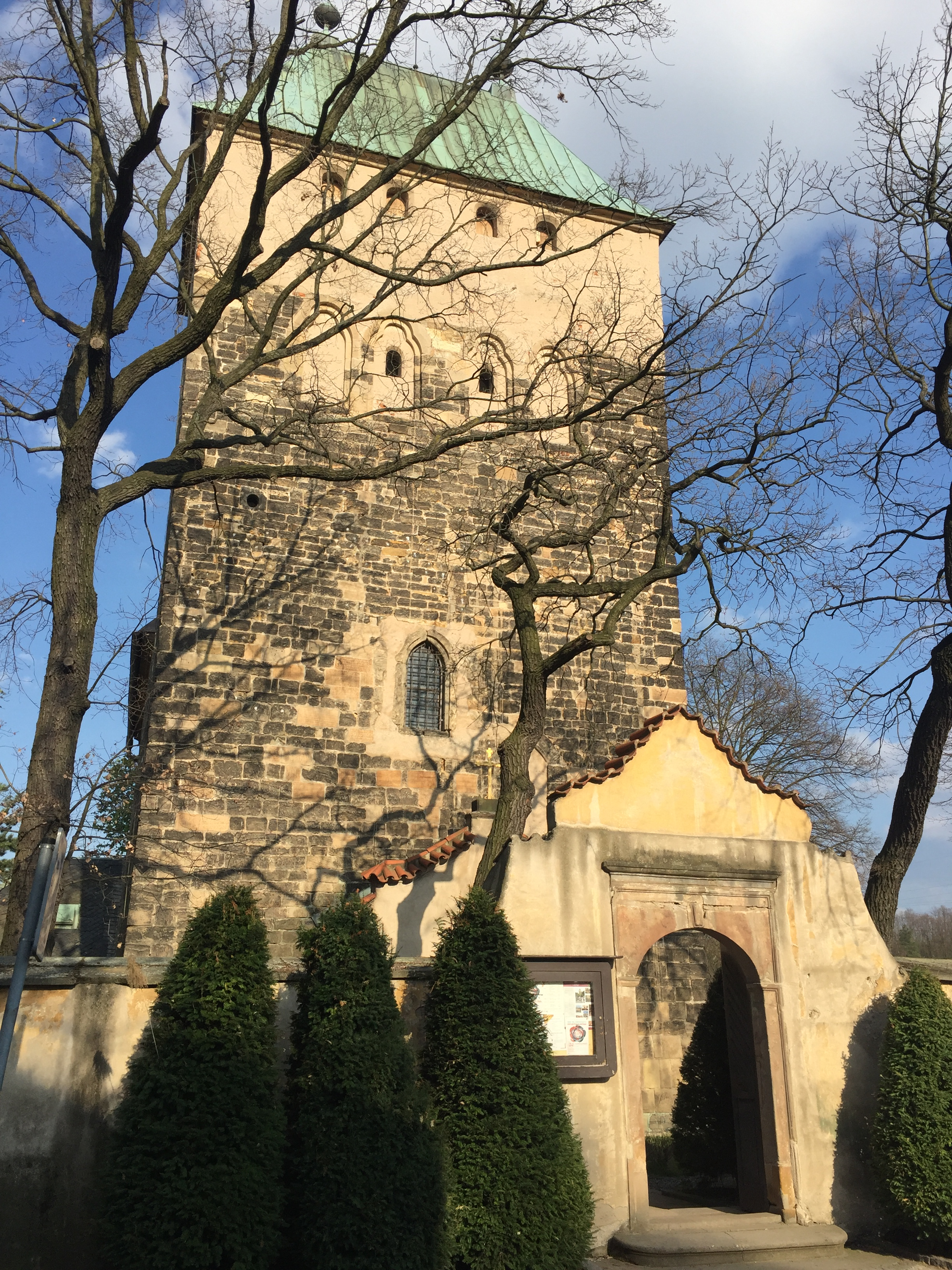 portál vedoucí ke kostelu, za kterým se tyčí mohutná věž